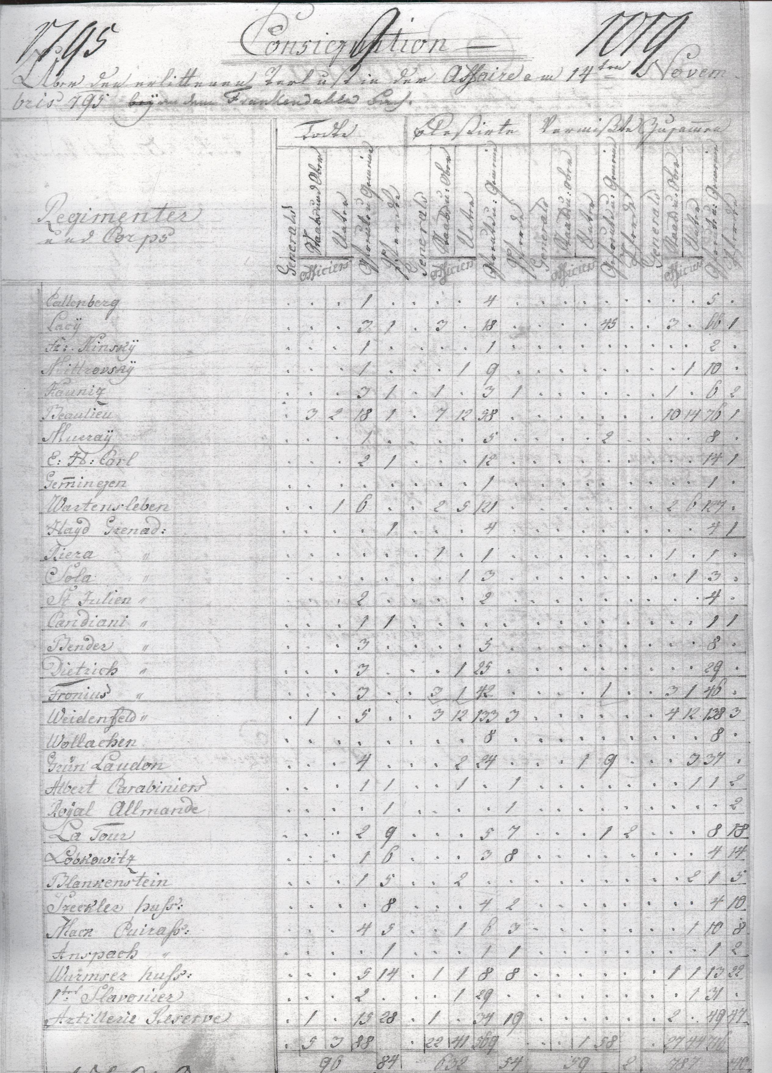 Lambsheim, Deutschland, Rheinland-Pfalz, deutsche Verlustliste vom dortigen Gefecht vom 14.11.1795